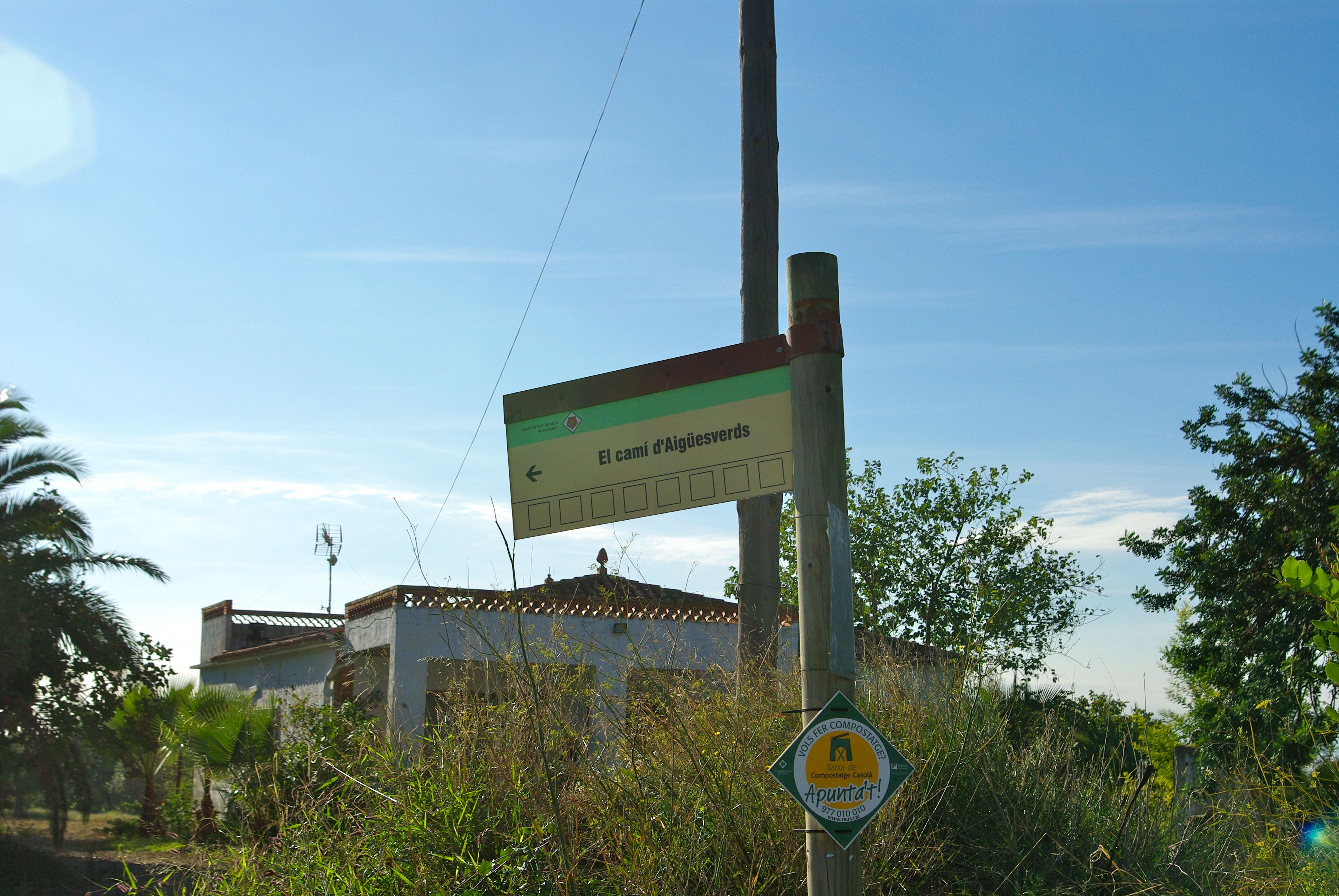 Camí d'Aigüesverds, al terme de Reus